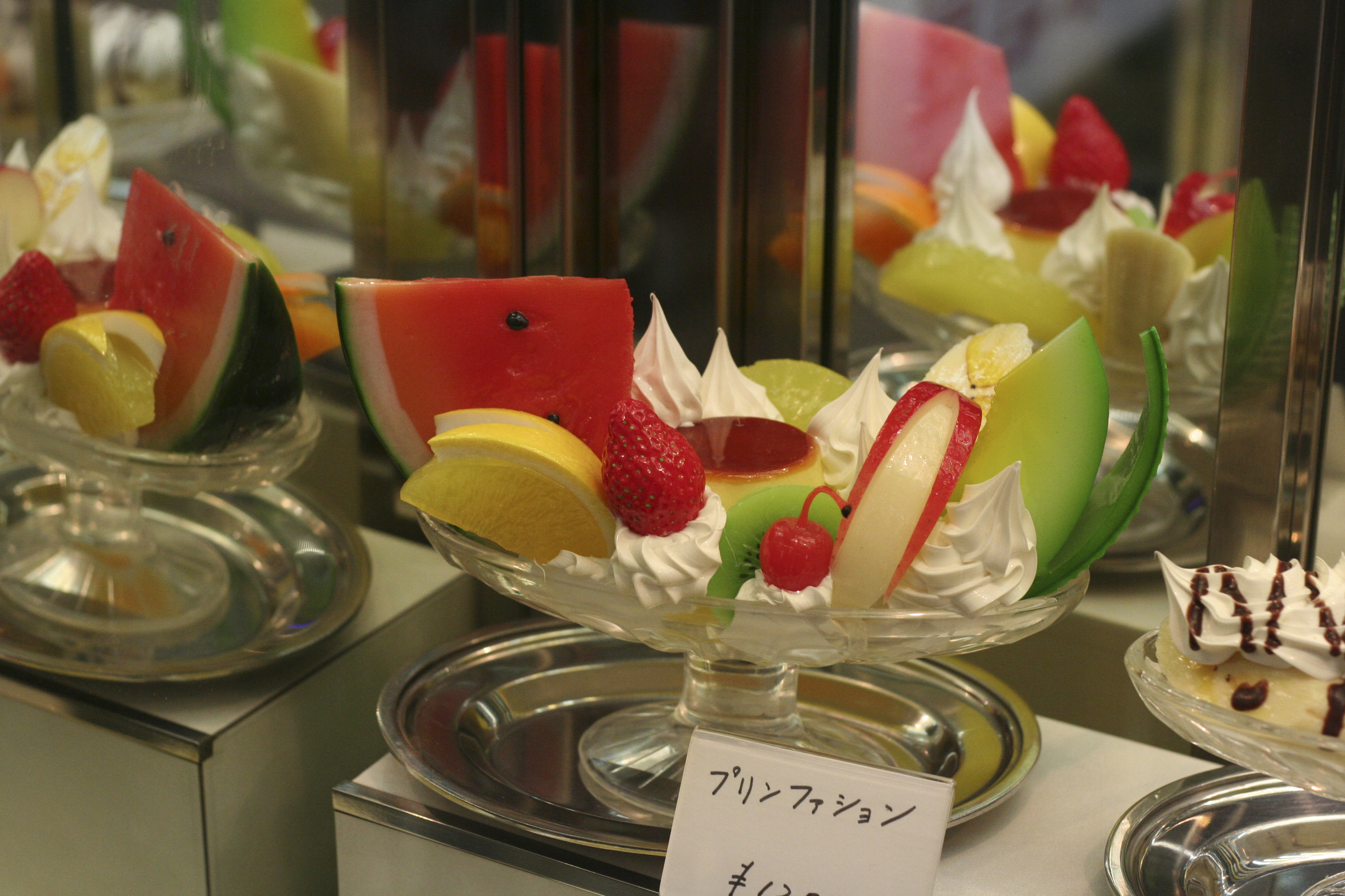 パフェの食品サンプル(大阪市中央区）